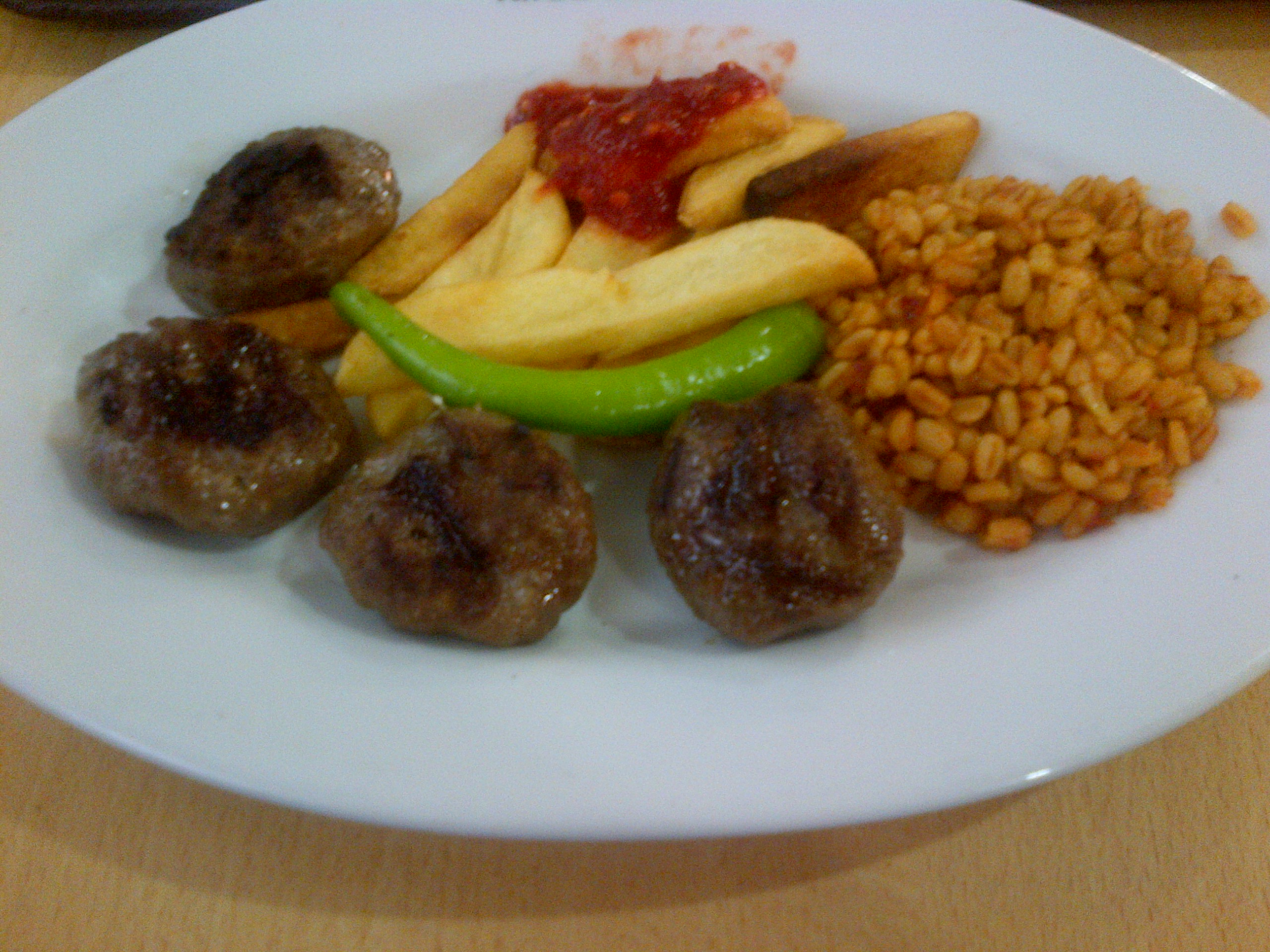 Köftes con patatas fritas y "bulgur pilavı" de la cocina turca.